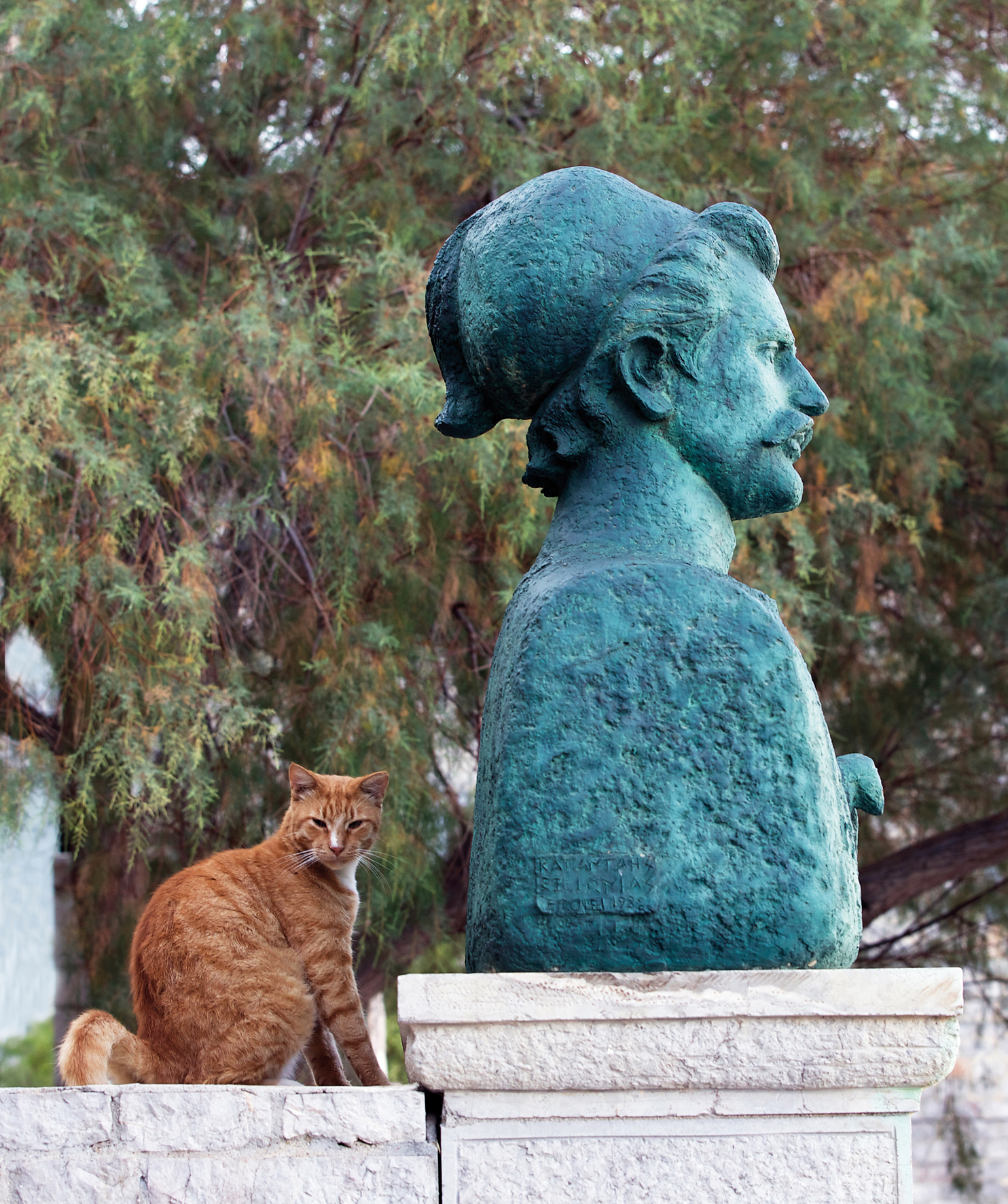 Büste von Antonis Oikonomou mit Katze